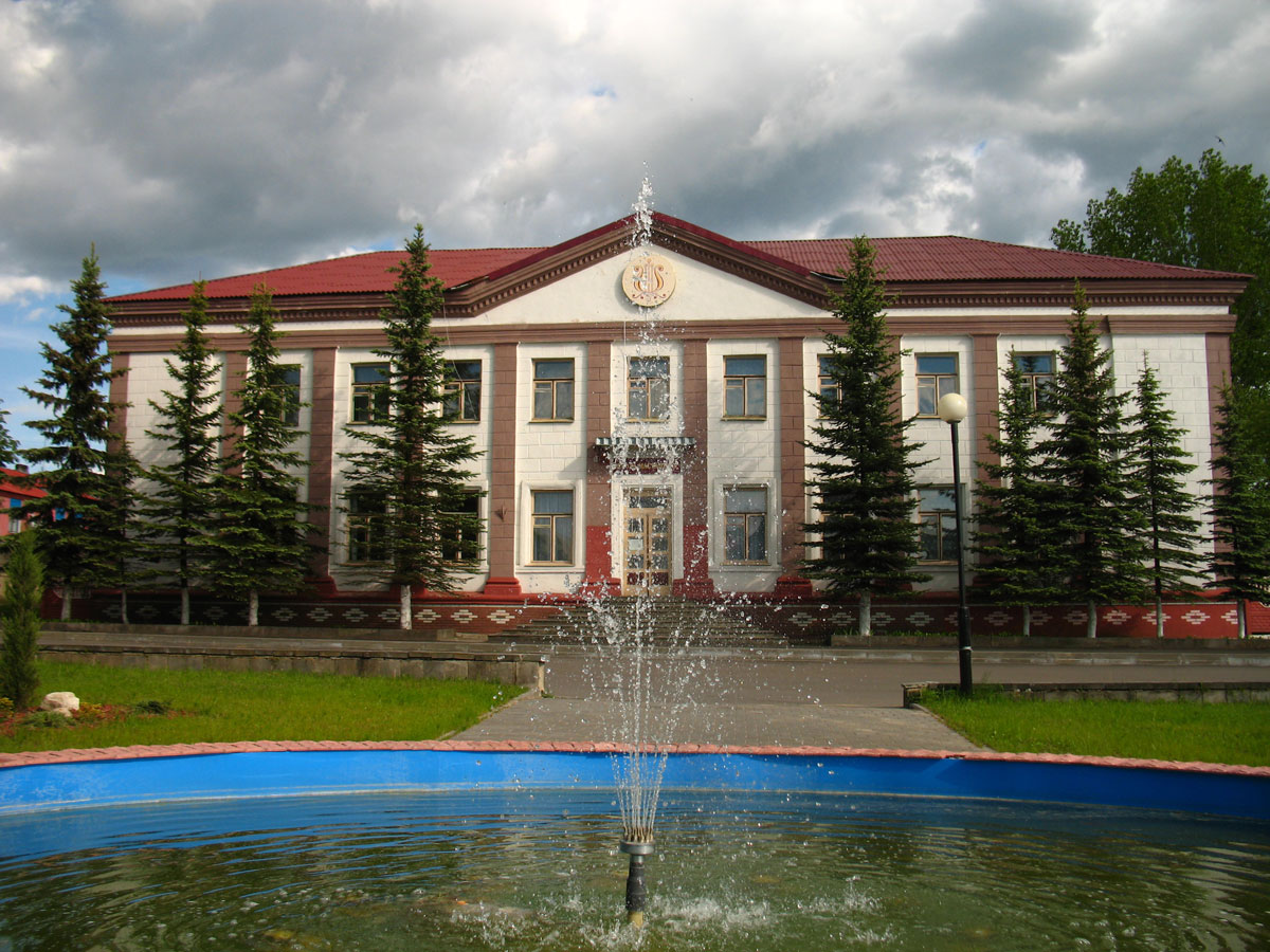 Беларуская (тарашкевіца): Докшыцы